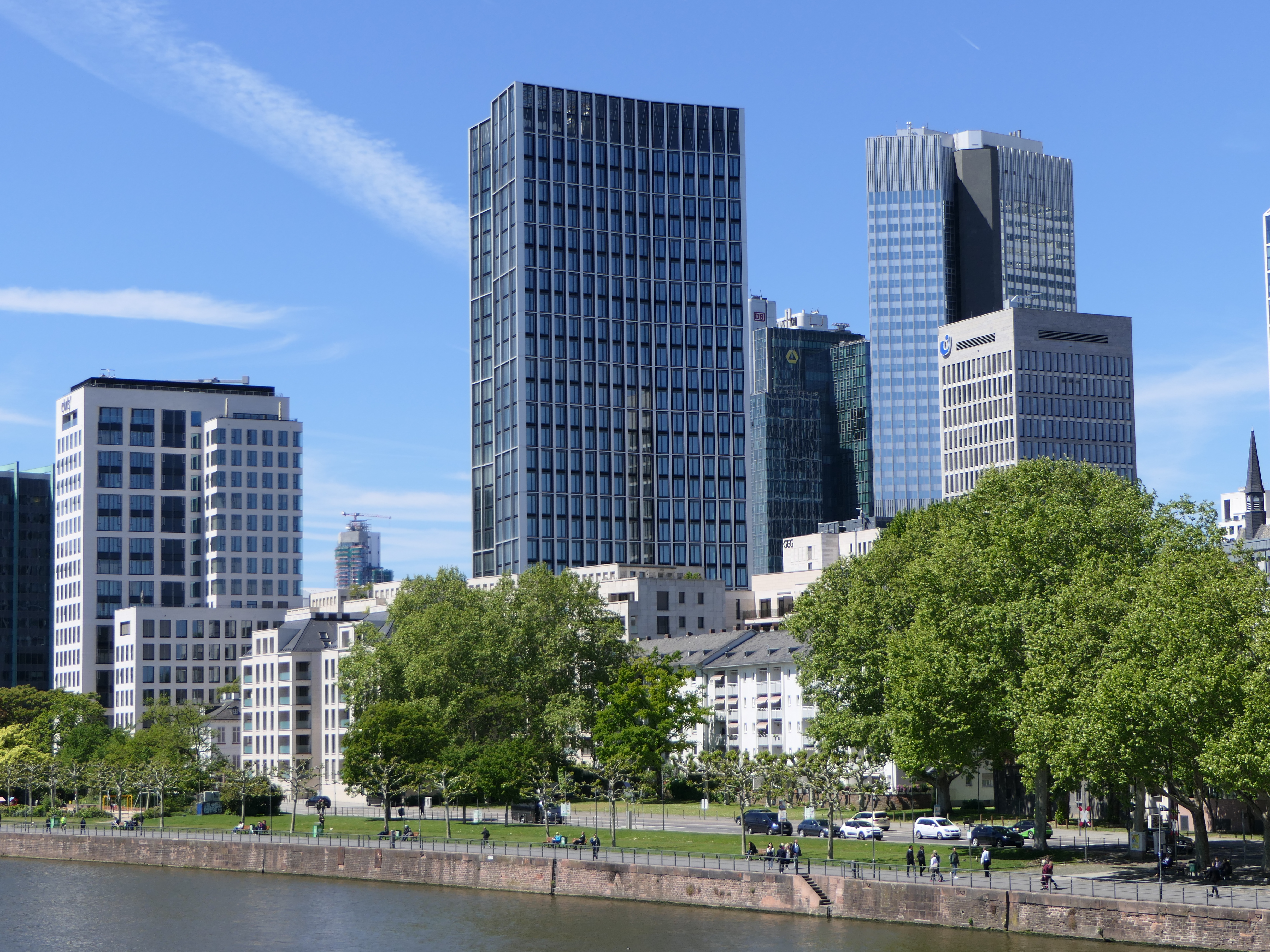 Das Hochhaus "WinX" in Frankfurt, flankiert vom "Maintor Panorama" links, sowie "Maintor Porta" rechts. Allesamt auf dem ehemaligen Degussa-Areal am Main.